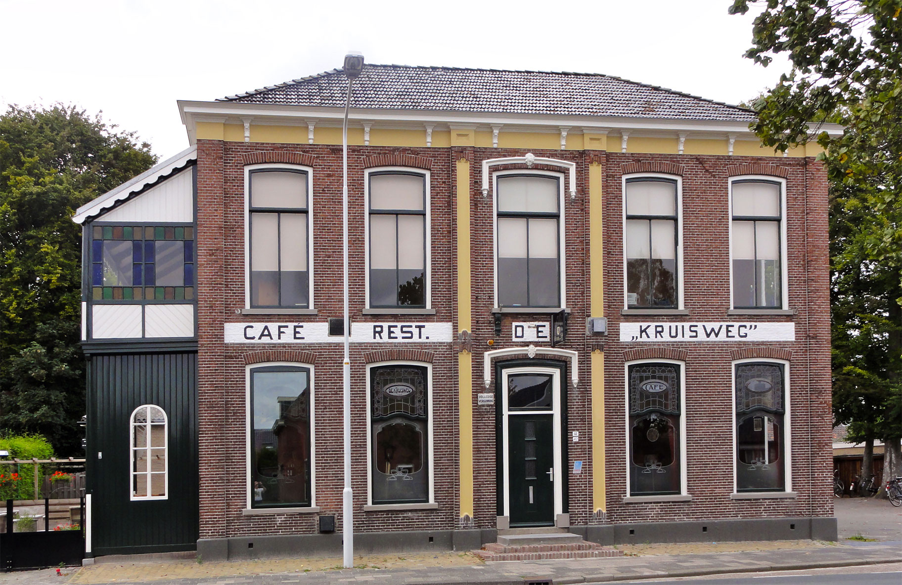 Hoofdweg 42 Damwoude